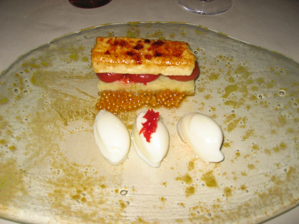 Auberge Marc et Paul Haeberlin - Alsace